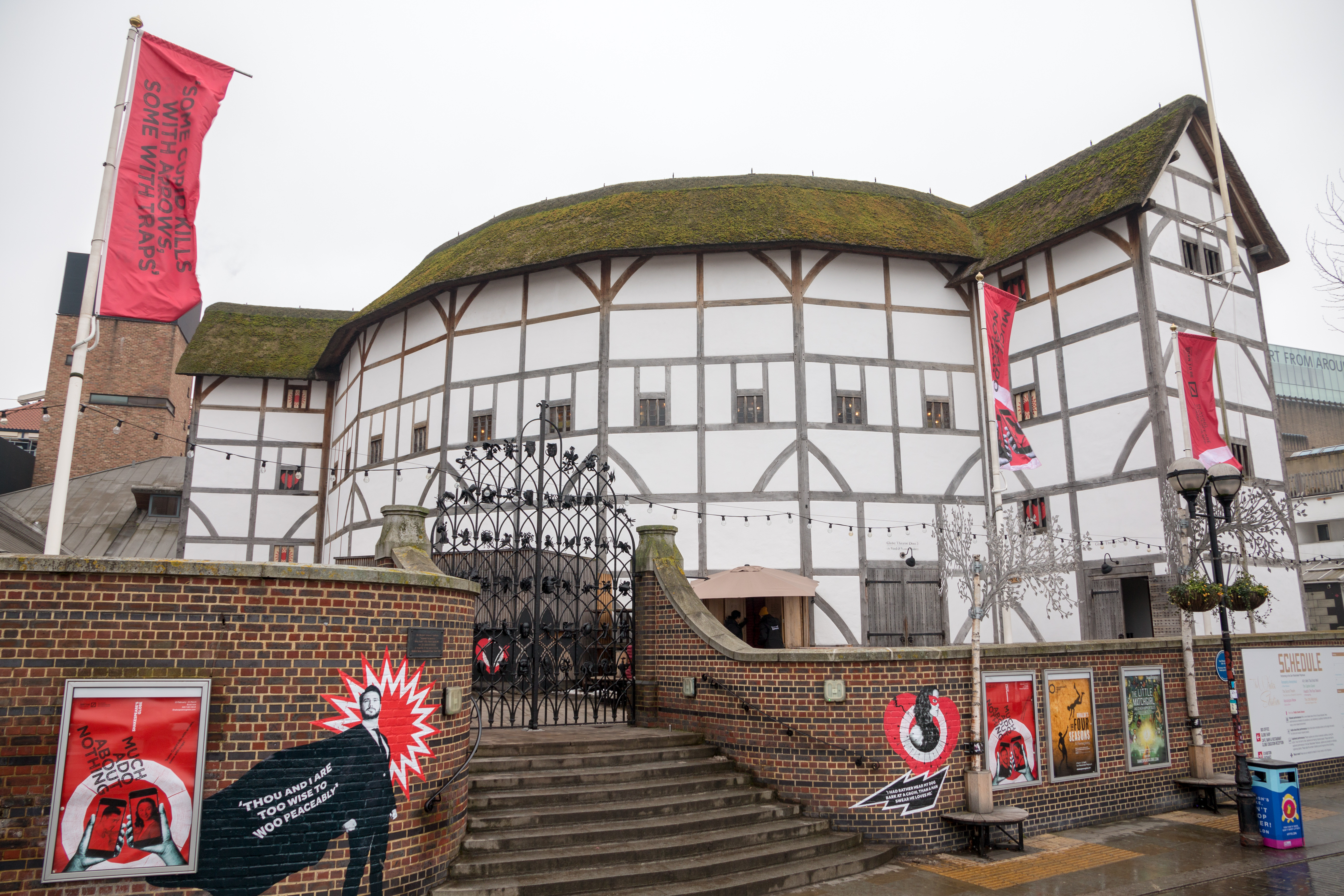 London March 2018. See profile for image use.